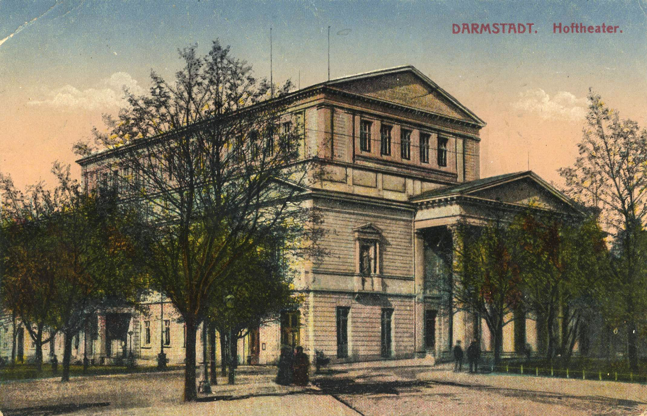 Ansichtskarte des Hoftheaters in Darmstadt